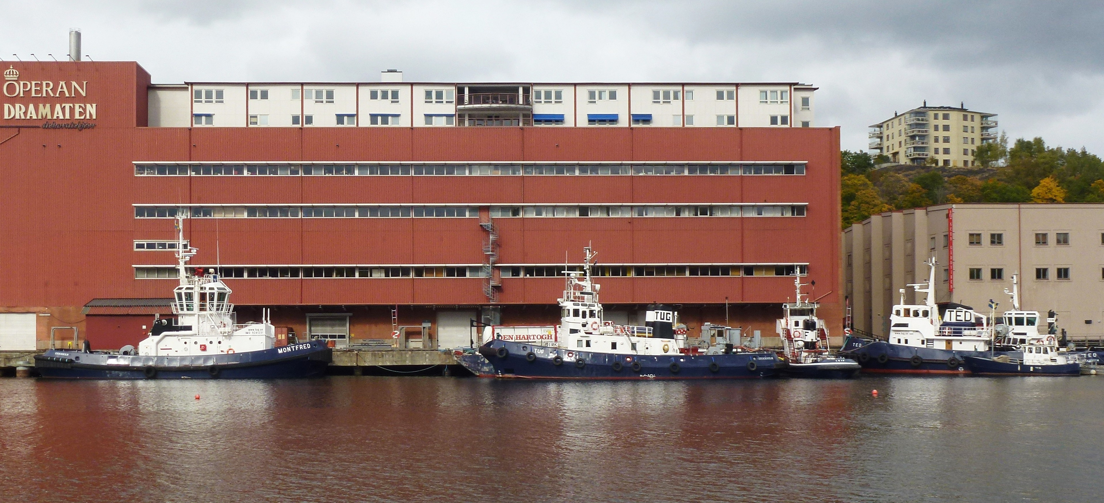 Marin & Haverikonsults bogserbåtar vid Gäddviken